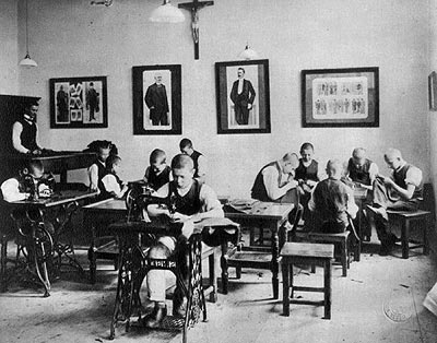 V období od roku 1902 do 1915 systematicky vytvářel obrazovou dokumentaci Prahy.